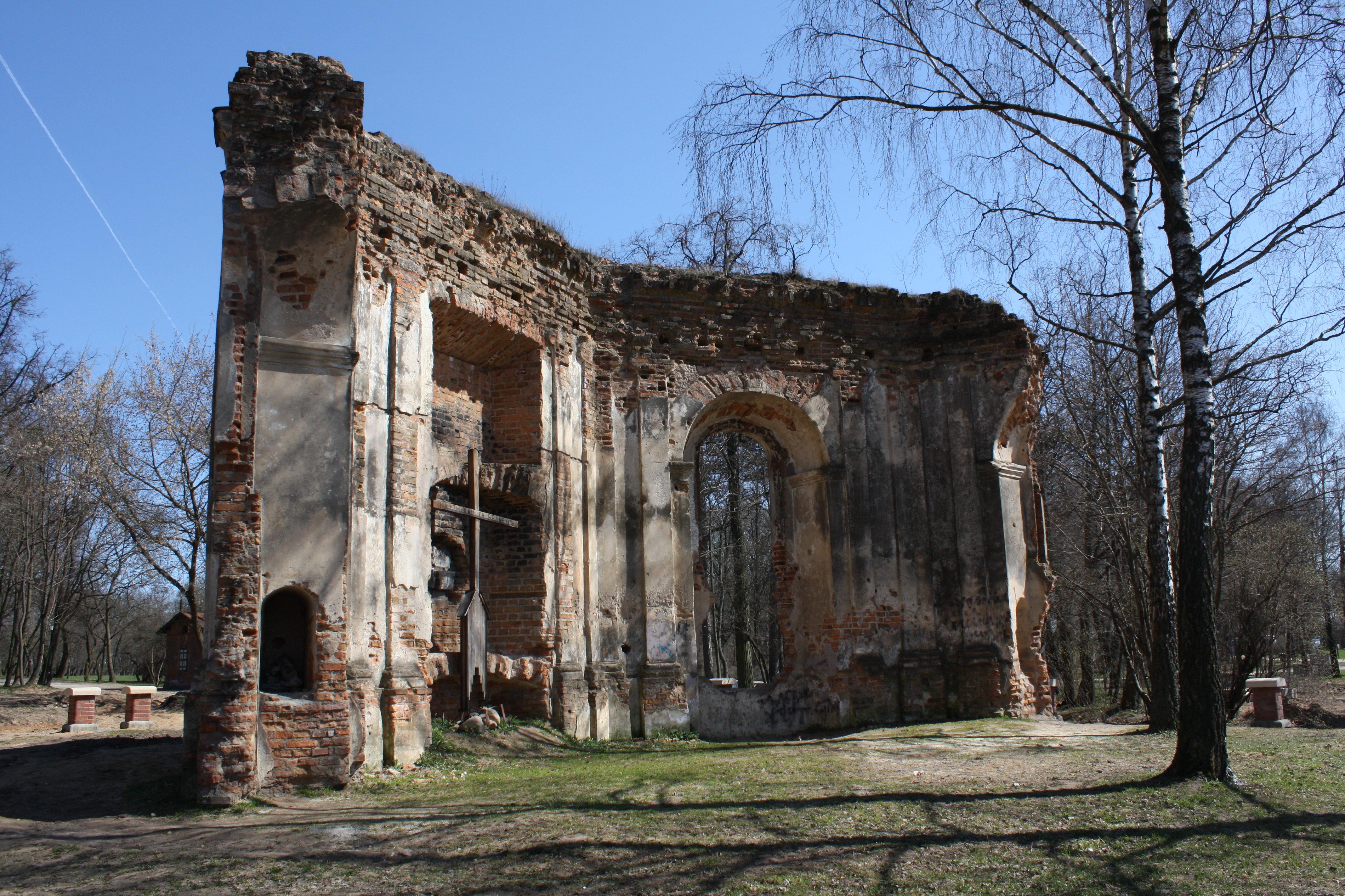 Беларуская (тарашкевіца): Лошыцкі сядзібна-паркавы комплекс: парк, сядзібны дом, флігель, домік вартаўніка, рэшткі капліцы, рэшткі млына, комплекс бровара, будынак былога млына. г. Менск This is a photo of Belarusian heritage monument. Reference number: 712Г000266 ( WLM)